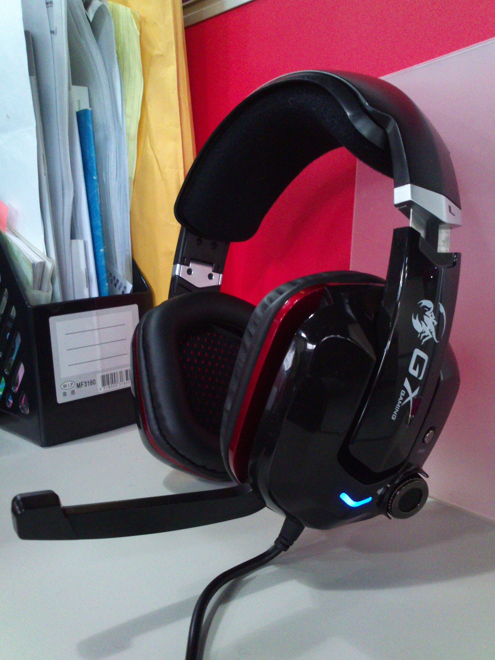 Игровые наушники Genius с подсветкой, микрофоном и функцией вибрации